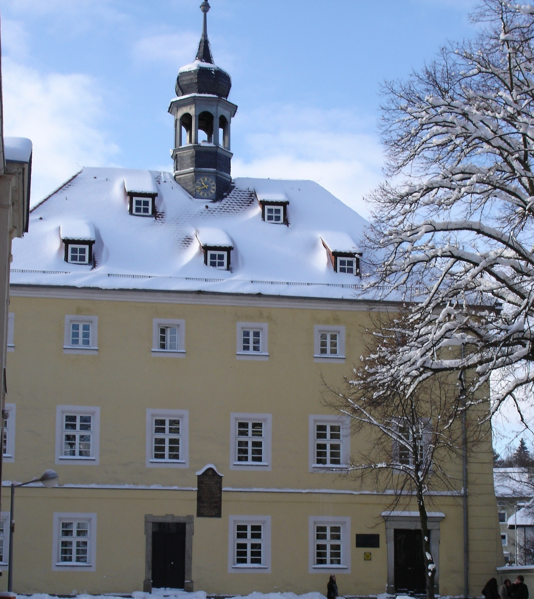 ehemaliges Franziskanerkloster Hof, nach der Reformation Gymnasium Albertinum Hof, heute Musiksaal des Jean-Paul-Gymnasiums Hof